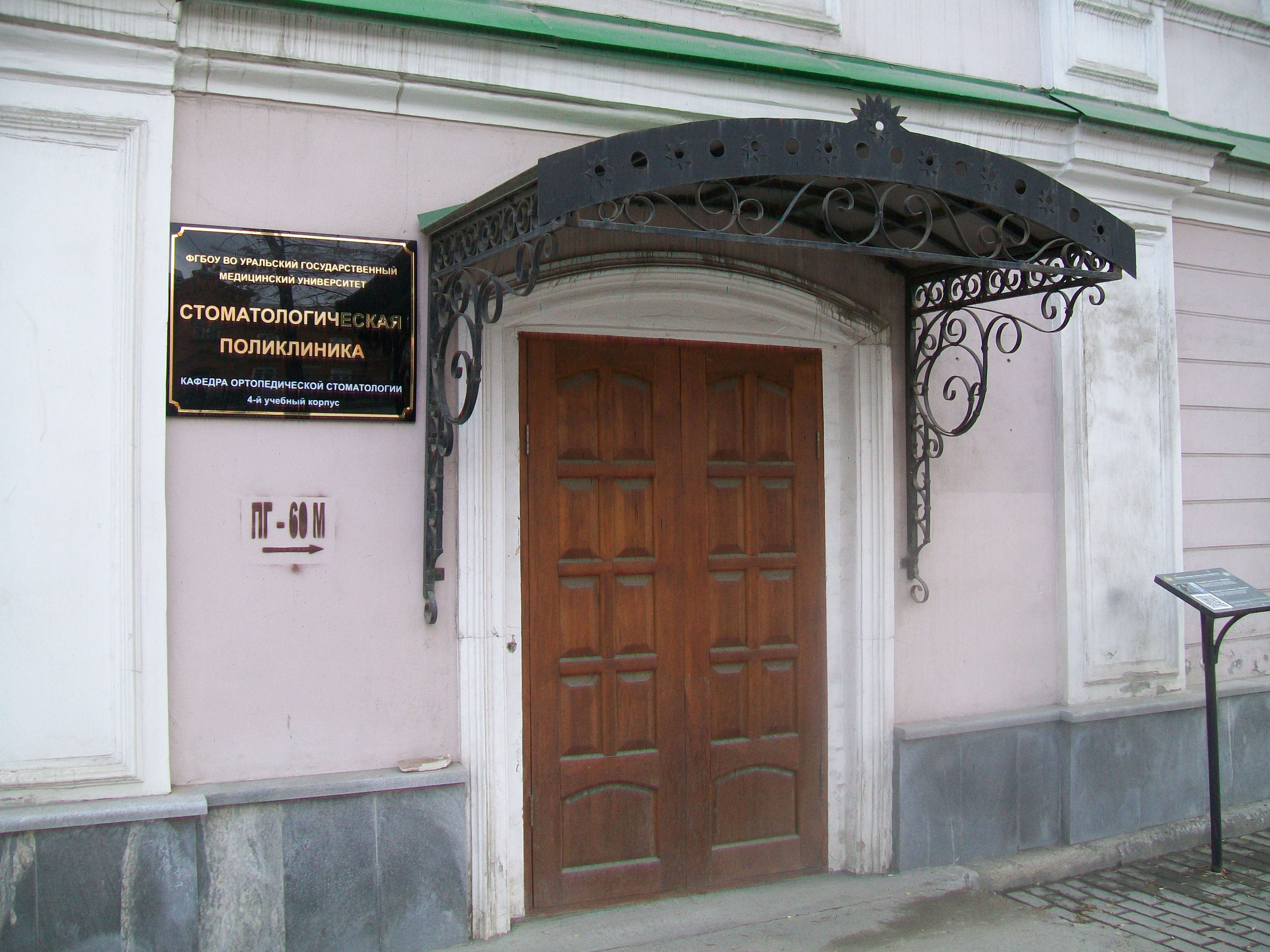 Стоматологическая поликлиника Уральского государственного медицинского университета, 16 апреля 2017 года (Екатеринбург)